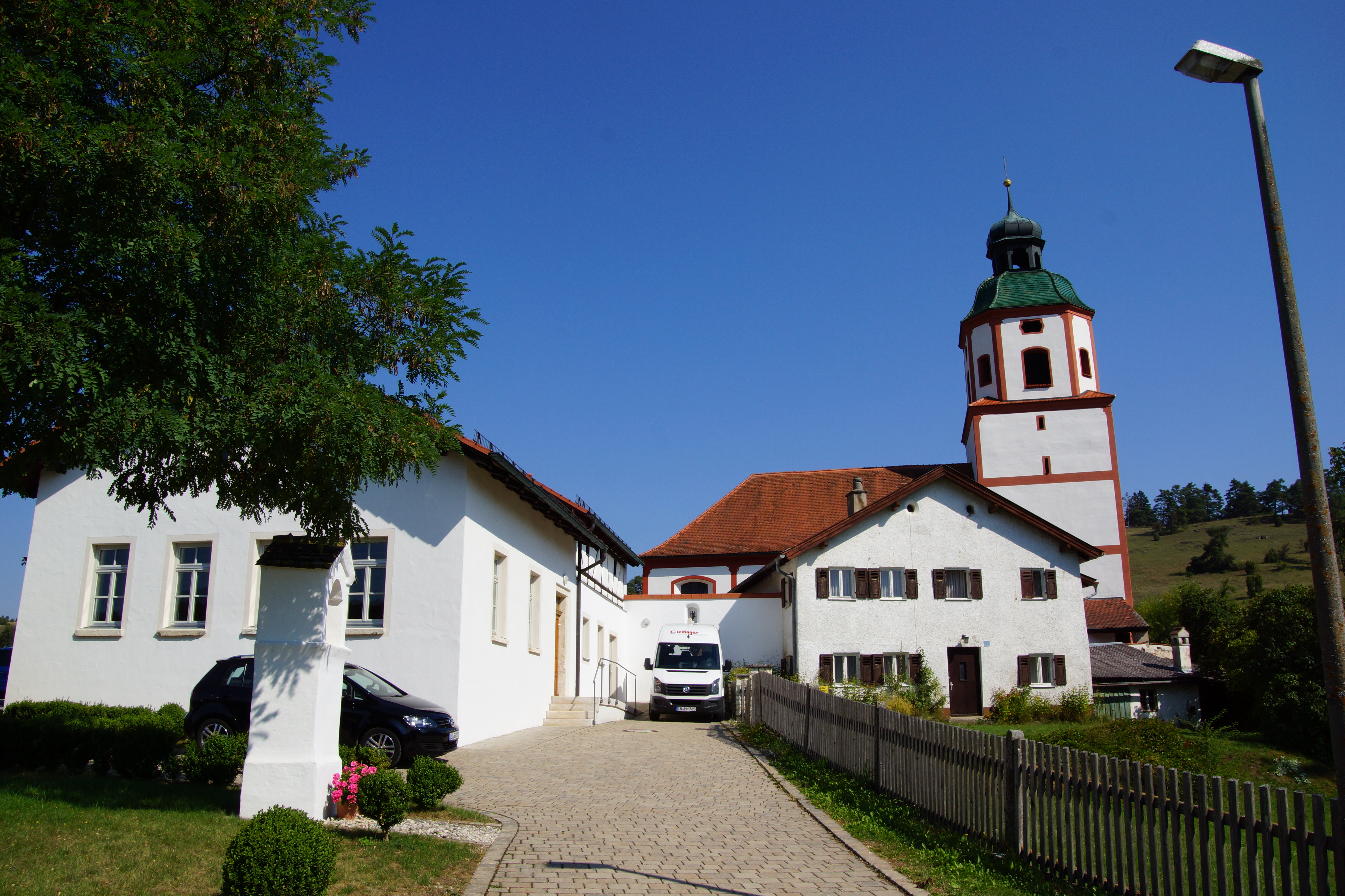 Die katholische Pfarrkirche Mariä Himmelfahrt in Gungolding